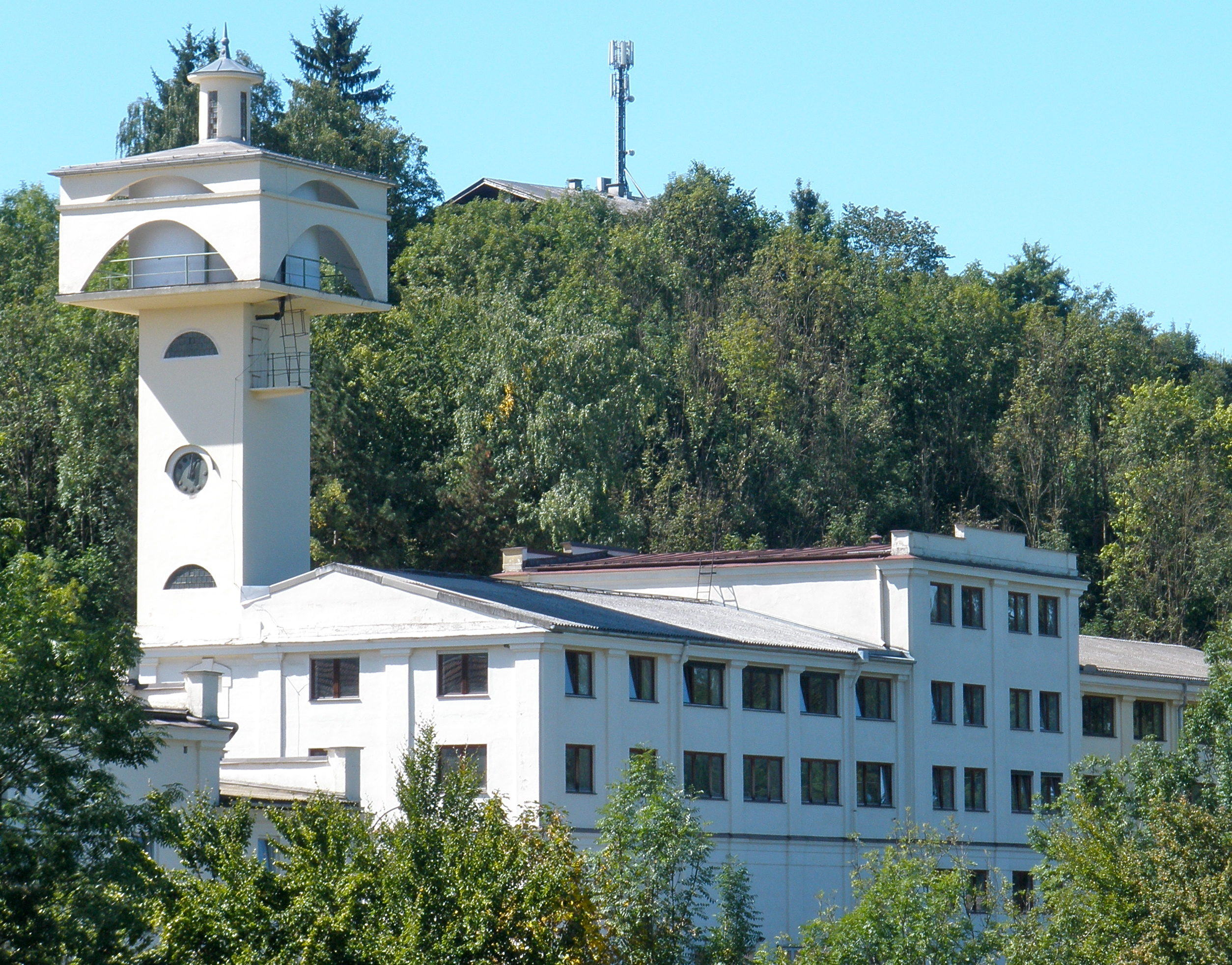 In der Brauerei Gmunden, die 1868 gegründet worden ist, wurde das "Gmundner Bier" gebraut. Die Brauerei Gmunden wurde 1969 an die Brau AG verkauft und wenig später stillgelegt.